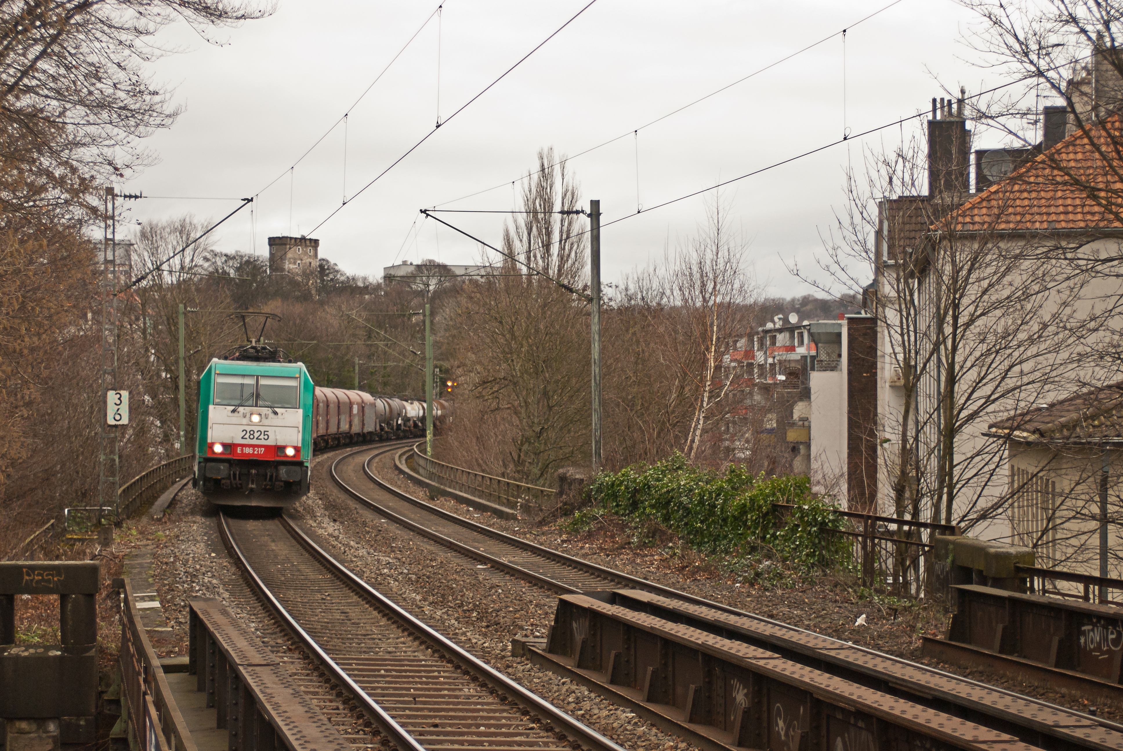 Der gemischte Güterzug Nr. 44557 von Kinkempois nach Köln-Gremberg, gezogen von einer SNCB-Lok der Baureihe 28, erreicht den Haltepunkt Aachen-Schanz